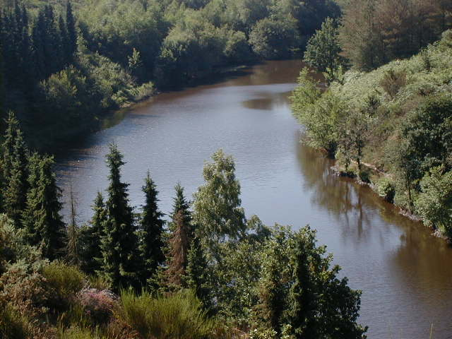 Vallon de la chambre au loup